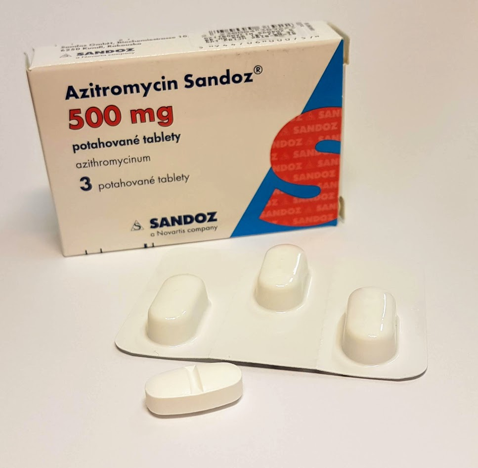 Tablety s azitromycinem pro perorální podání